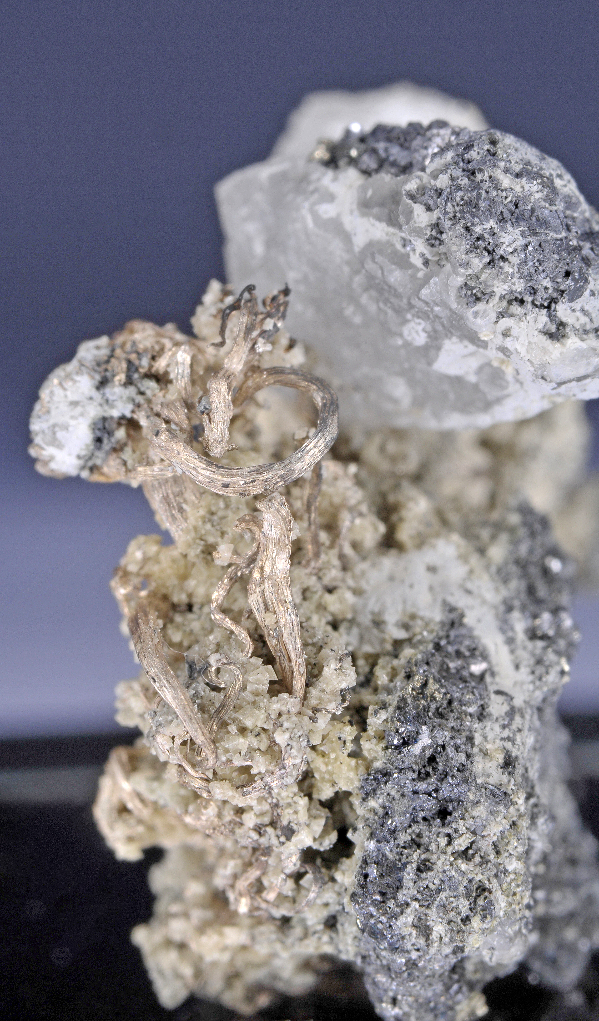 argent natif : Tongbai Mine, Weishancheng ore field, Tongbai County, Nanyang Prefecture, Henan Province, China